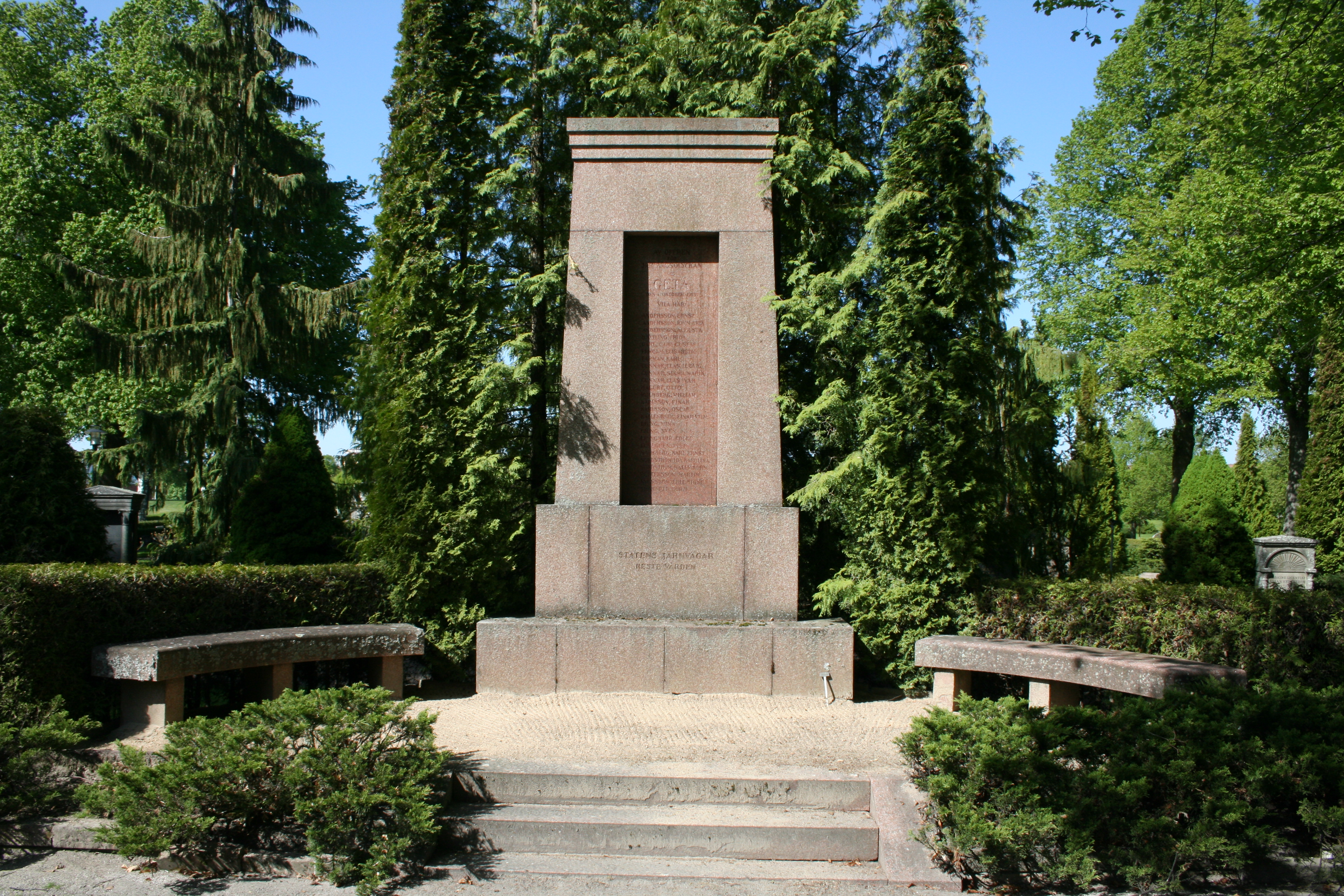 Minnesmärke Getåolyckan, Norra kyrkogården, Norrköping